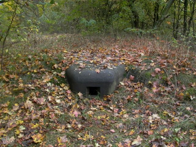 Fotografia przedstawia polską doświadczalną kopułę pancerną zamontowaną w Forcie XVI Twierdzy Modlin. Autor: Zbigniew Strucki.